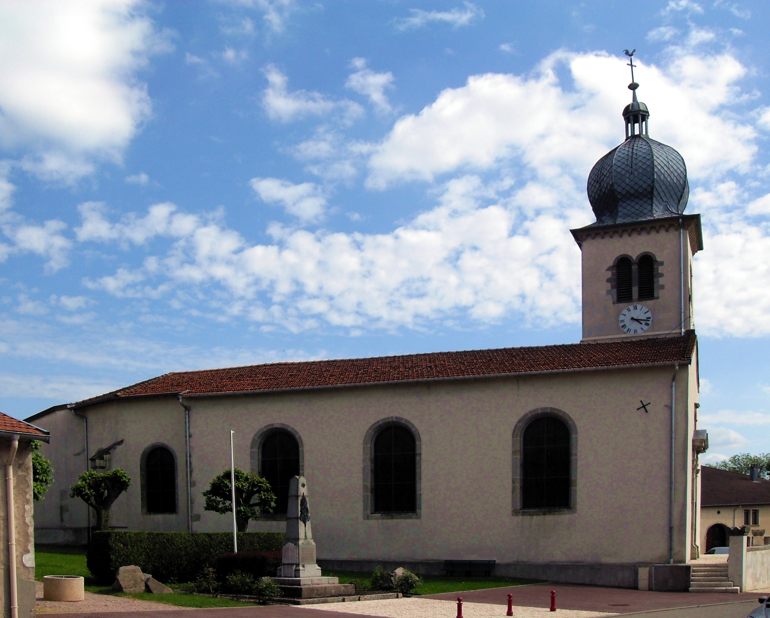 L'église Saint-Denis à Chamagne, côté nord